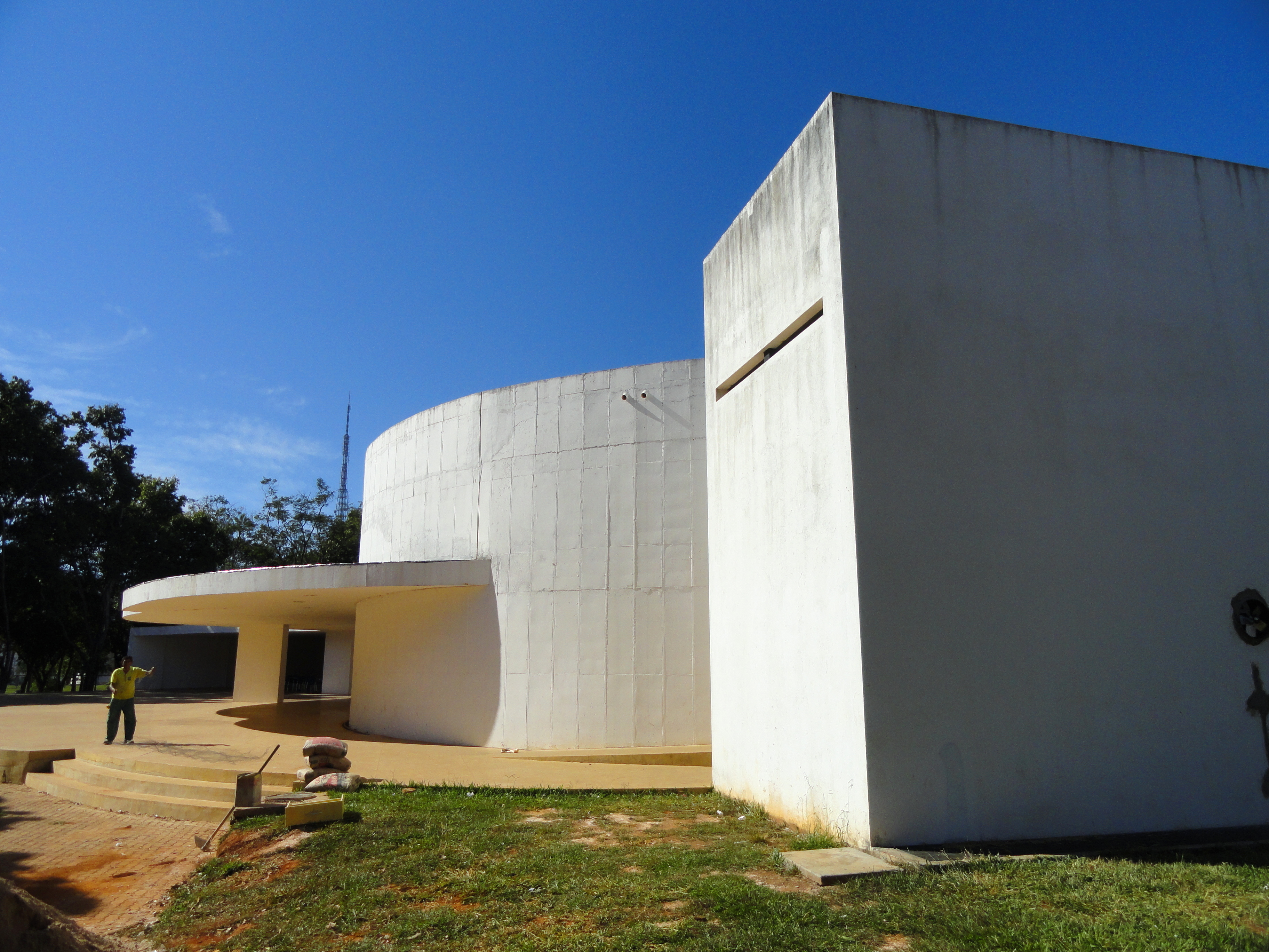 Clube do Choro, Brasília, Brazil.